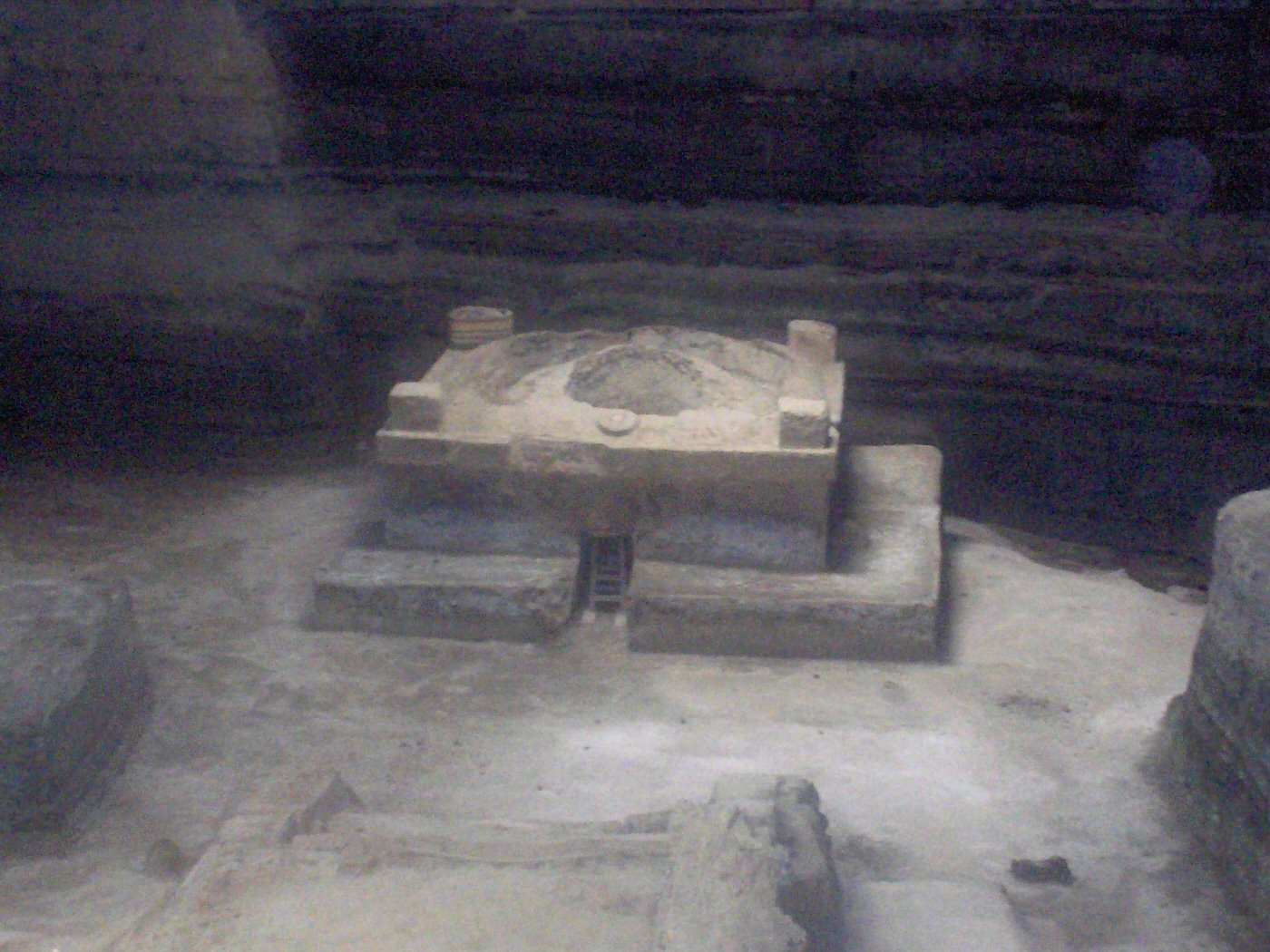 Estructura 9 en el area 2 de Joya de Ceren (El Salvador). Esta estructura era un baño de vapor llamado temazcal ysu domo es el unico que ha sido encontrado intacto en el Nuevo Mundo.